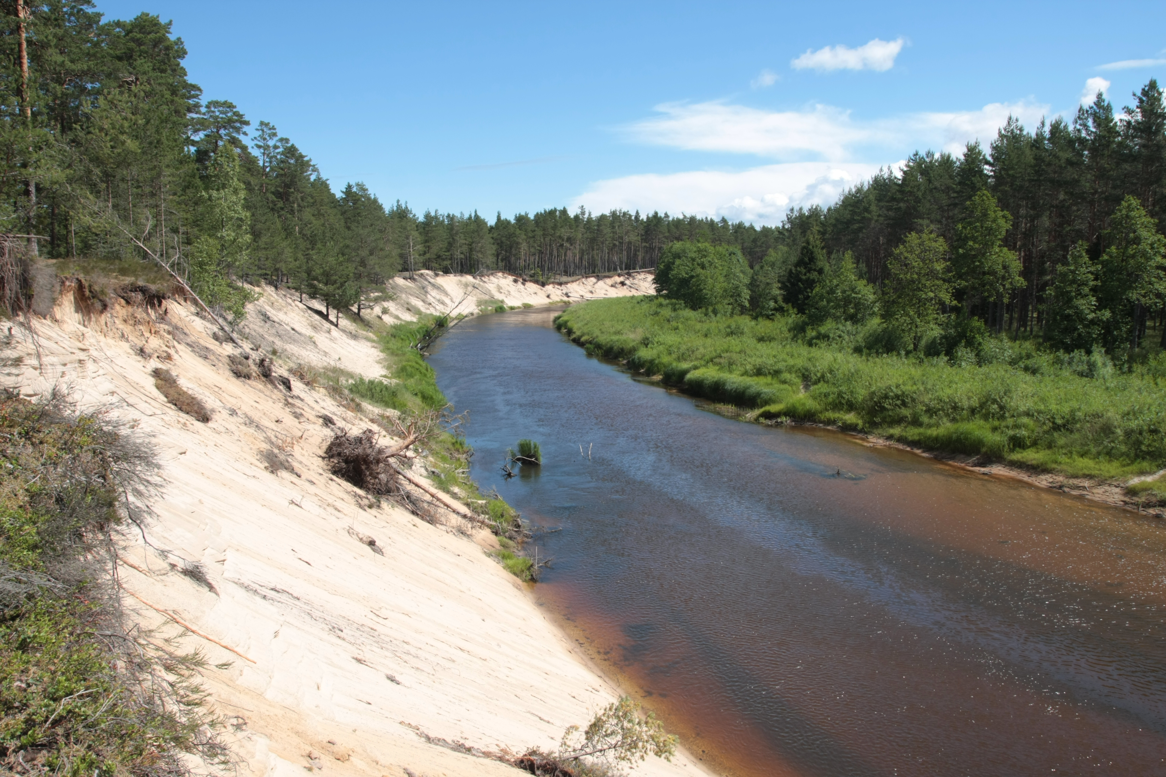 Irbes upe pie Miķeļtorņa, ĪADT Ances purvi un meži